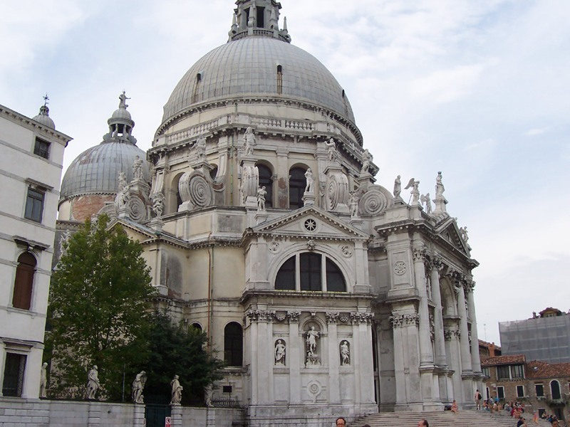 Venezia - Basilica di S. Maria della Salute